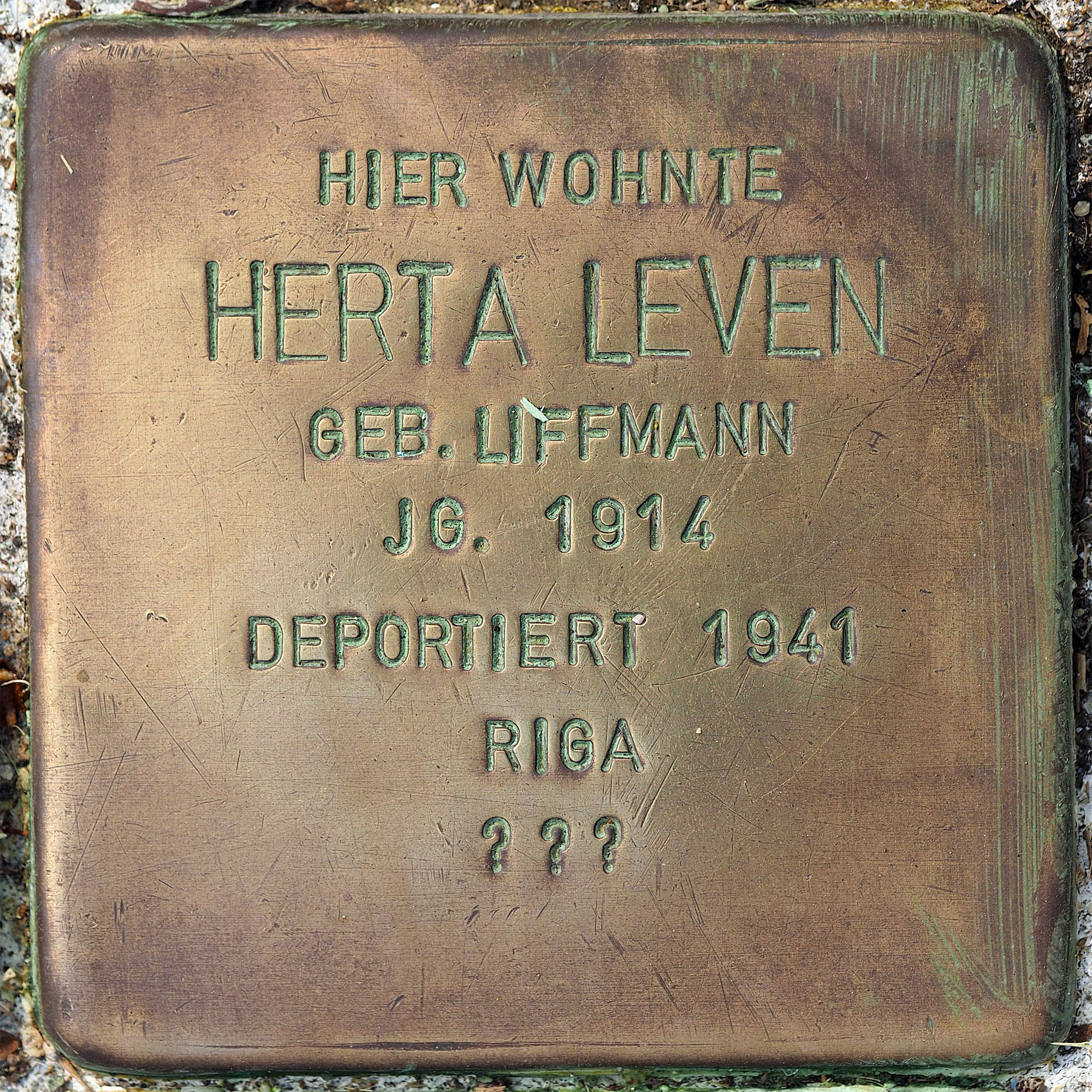 Stolpersteine MG: Leven, Herta